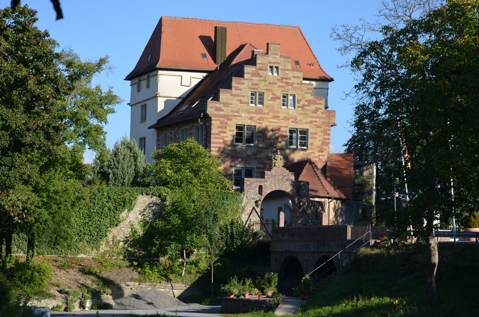 Schloss Neuburg bei Obrigheim.